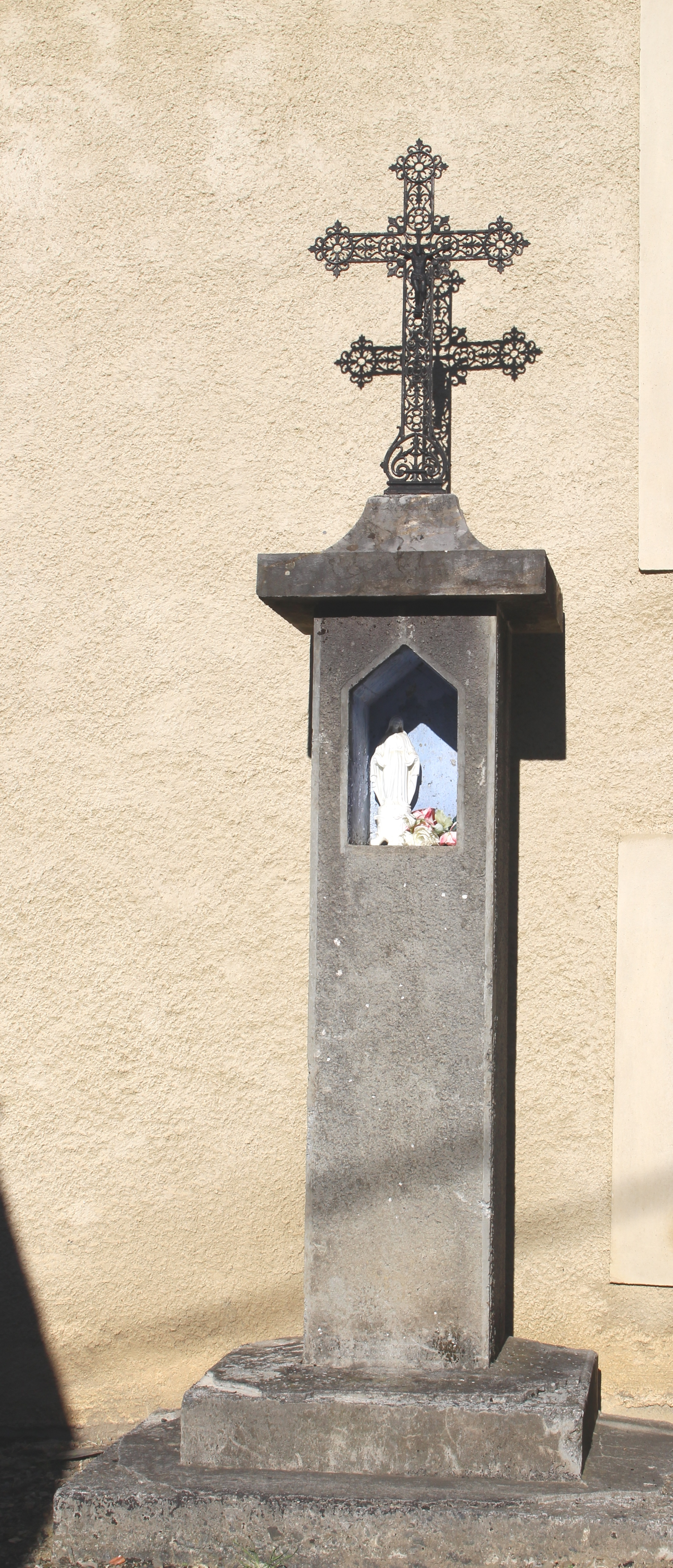 Croix de Vier-Bordes (Hautes-Pyrénées)